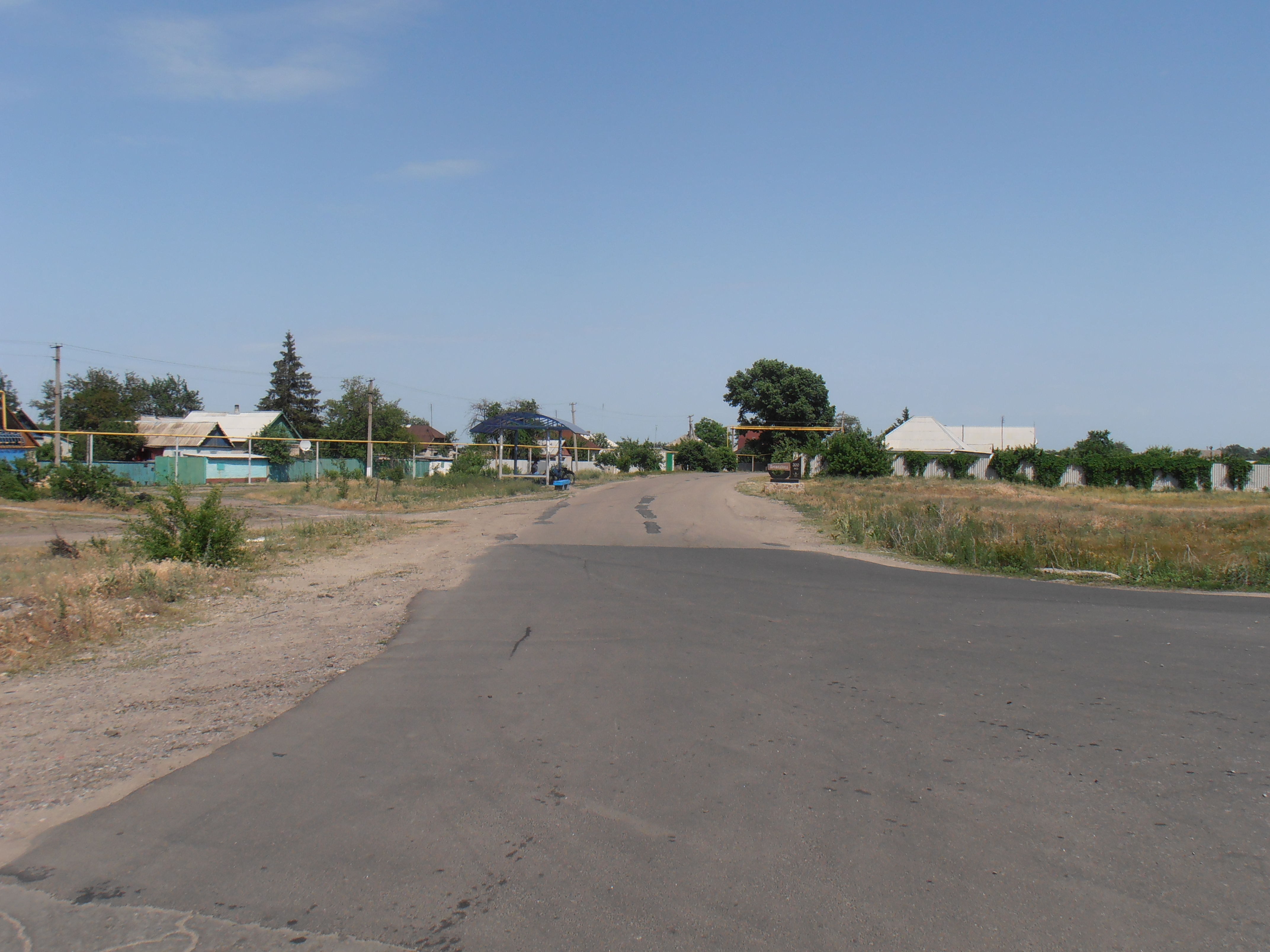 Початок Кооперативної вулиці у Воєводівці.